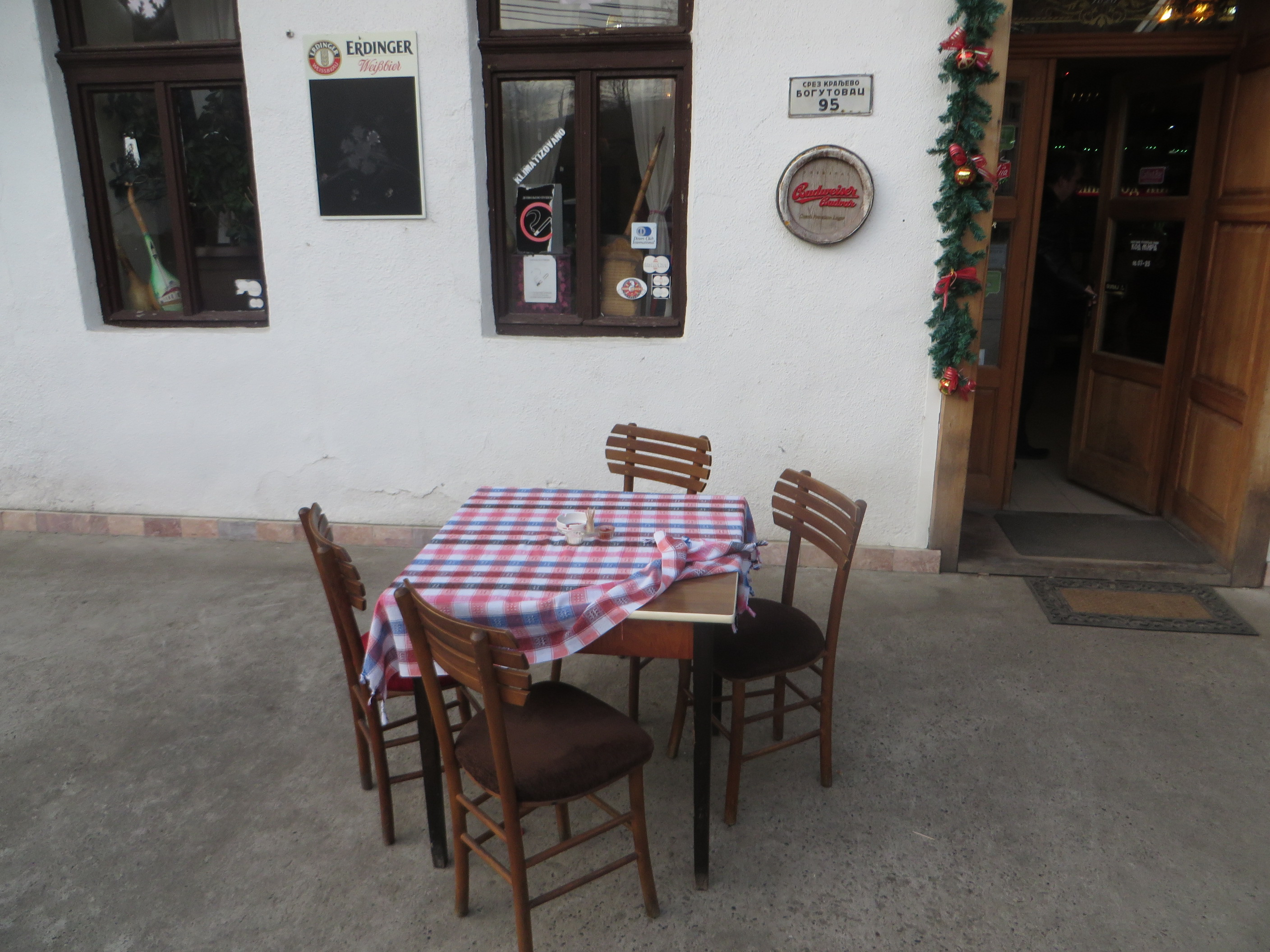 Kod Mira kafana